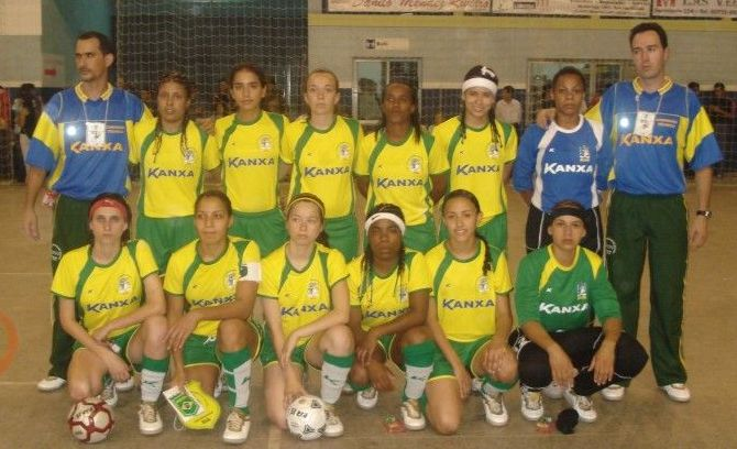 Foto da Seleção Brasileira de Futebol de Salão Feminino na Copa do Mundo de Mulheres AMF em 2006, na Argentina.